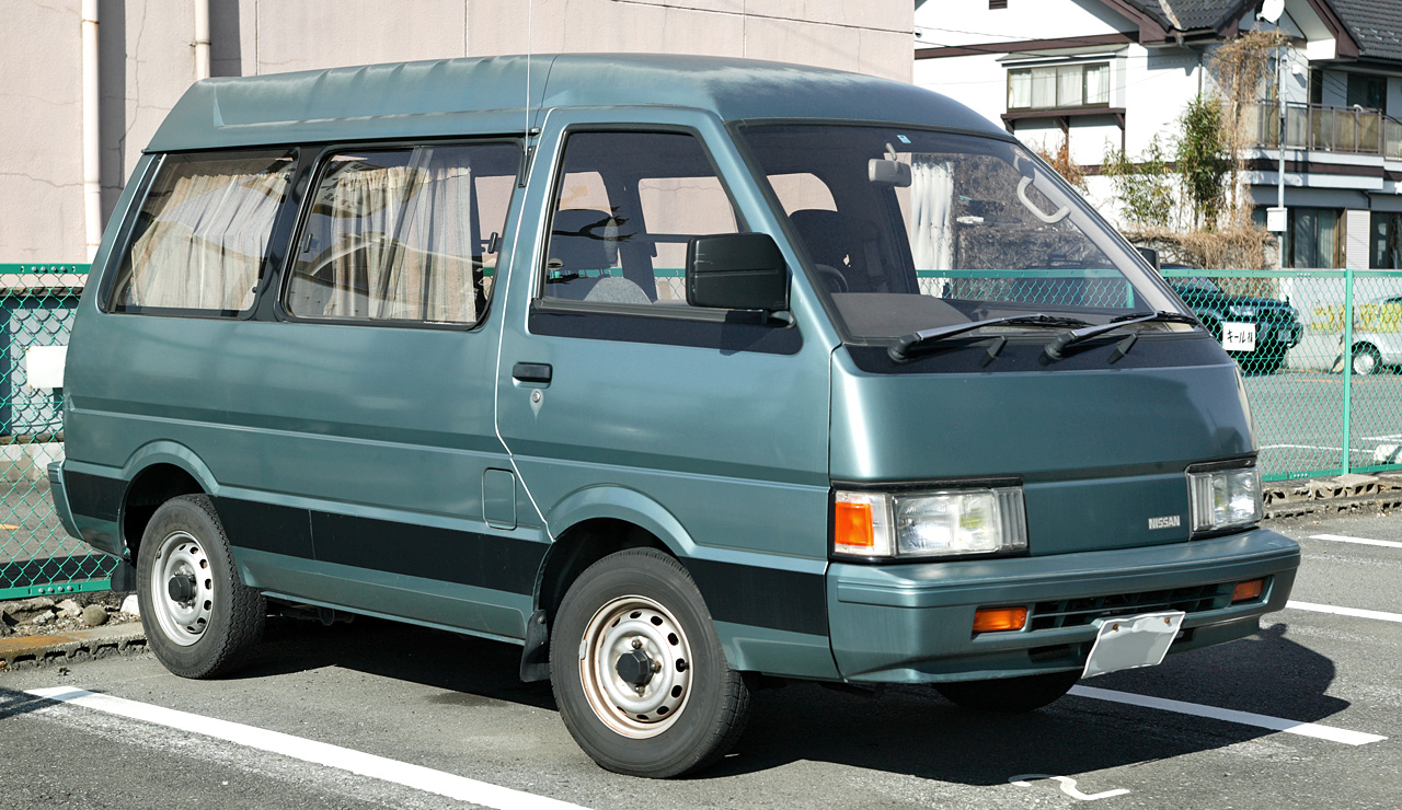 Nissan Vanette van VX ( VC22 )